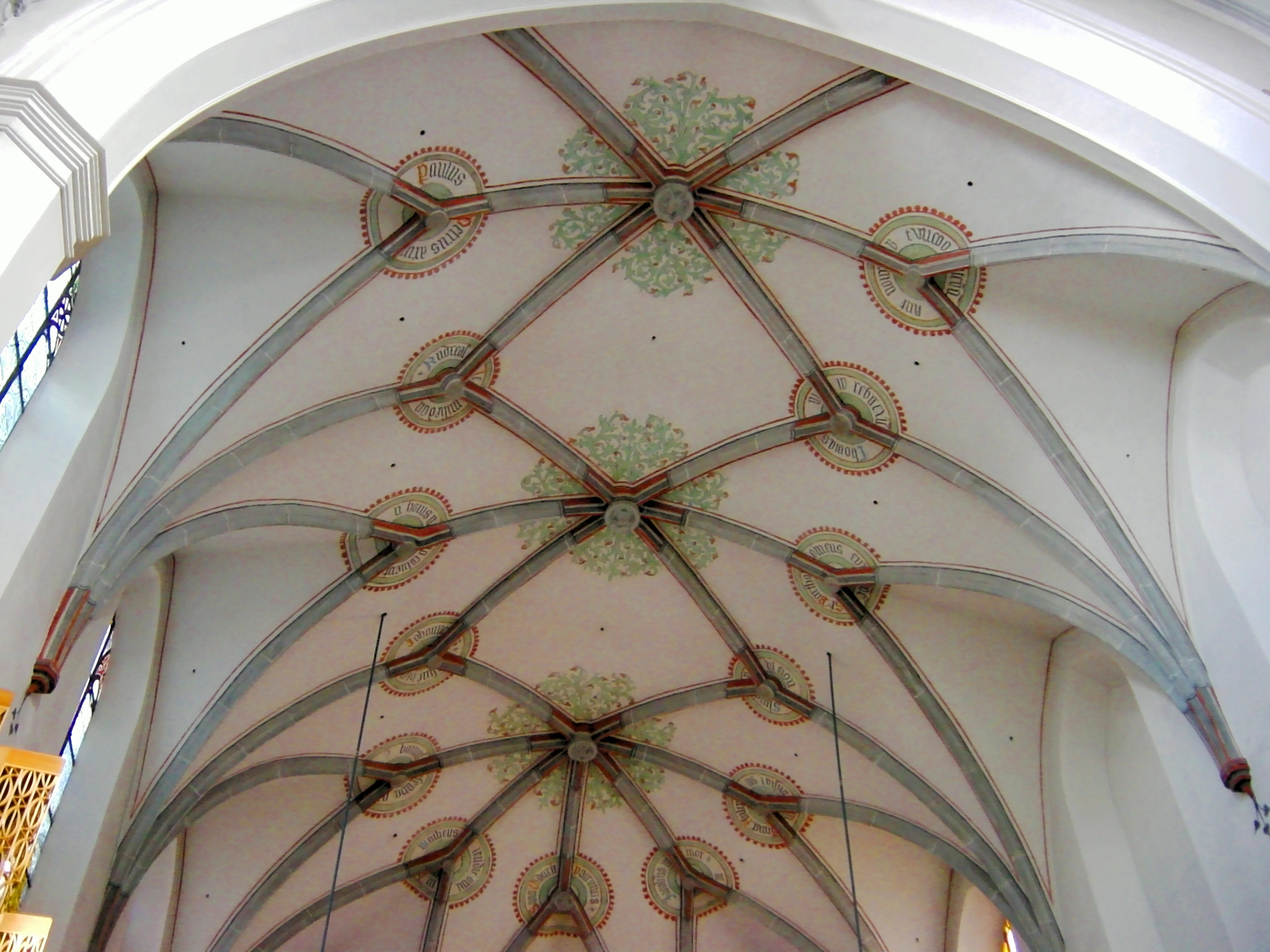 Kirche St. Mang in Kempten: Chorgewölbe